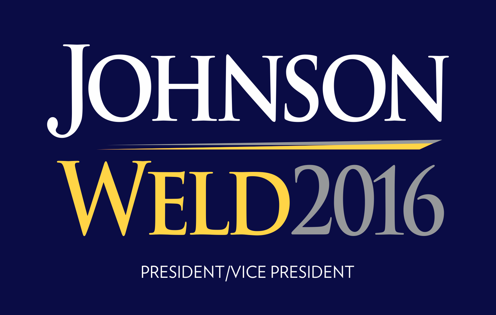 hi res navy (3)